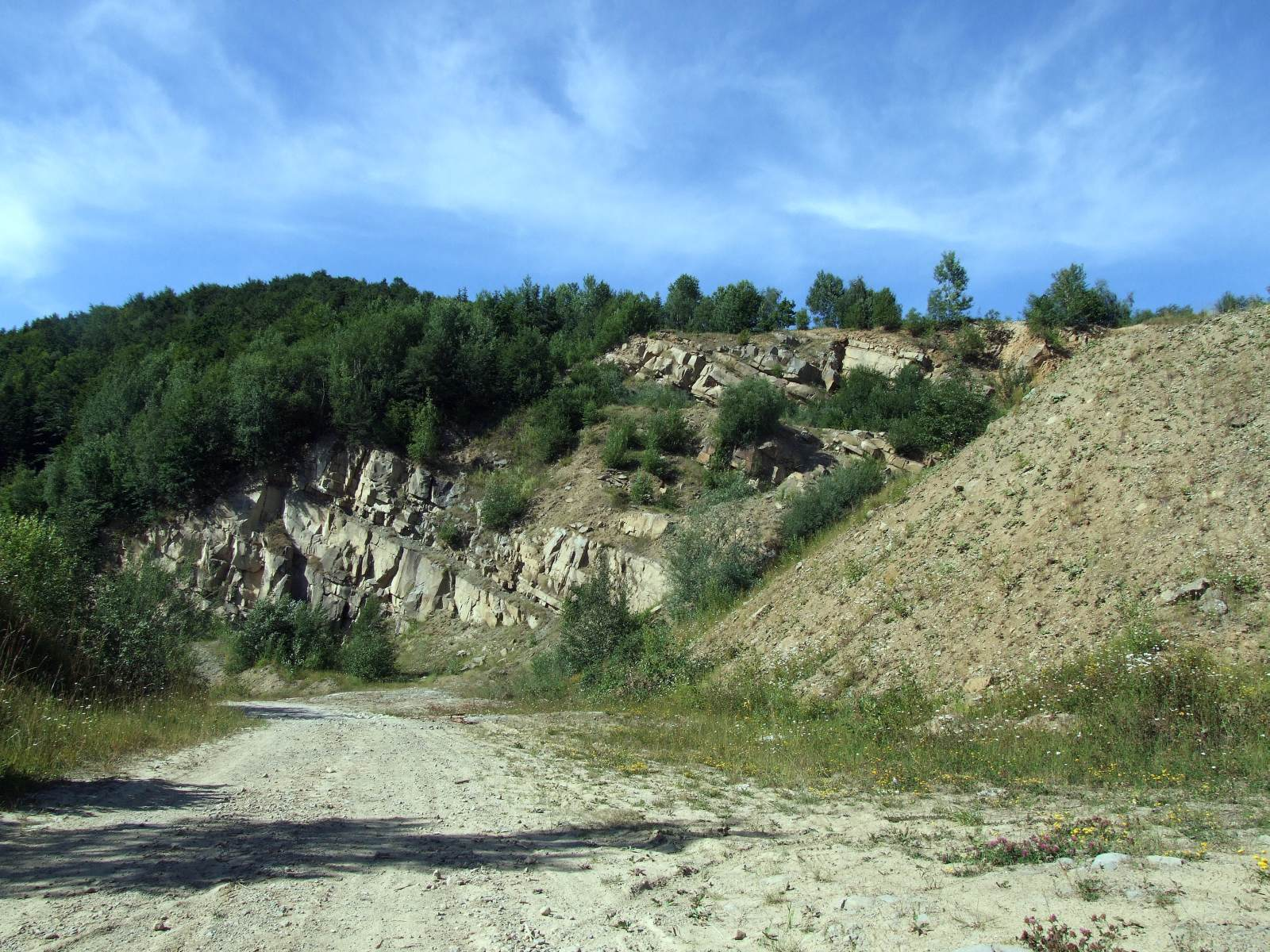 Nieczynny kamieniołom w Męcinie